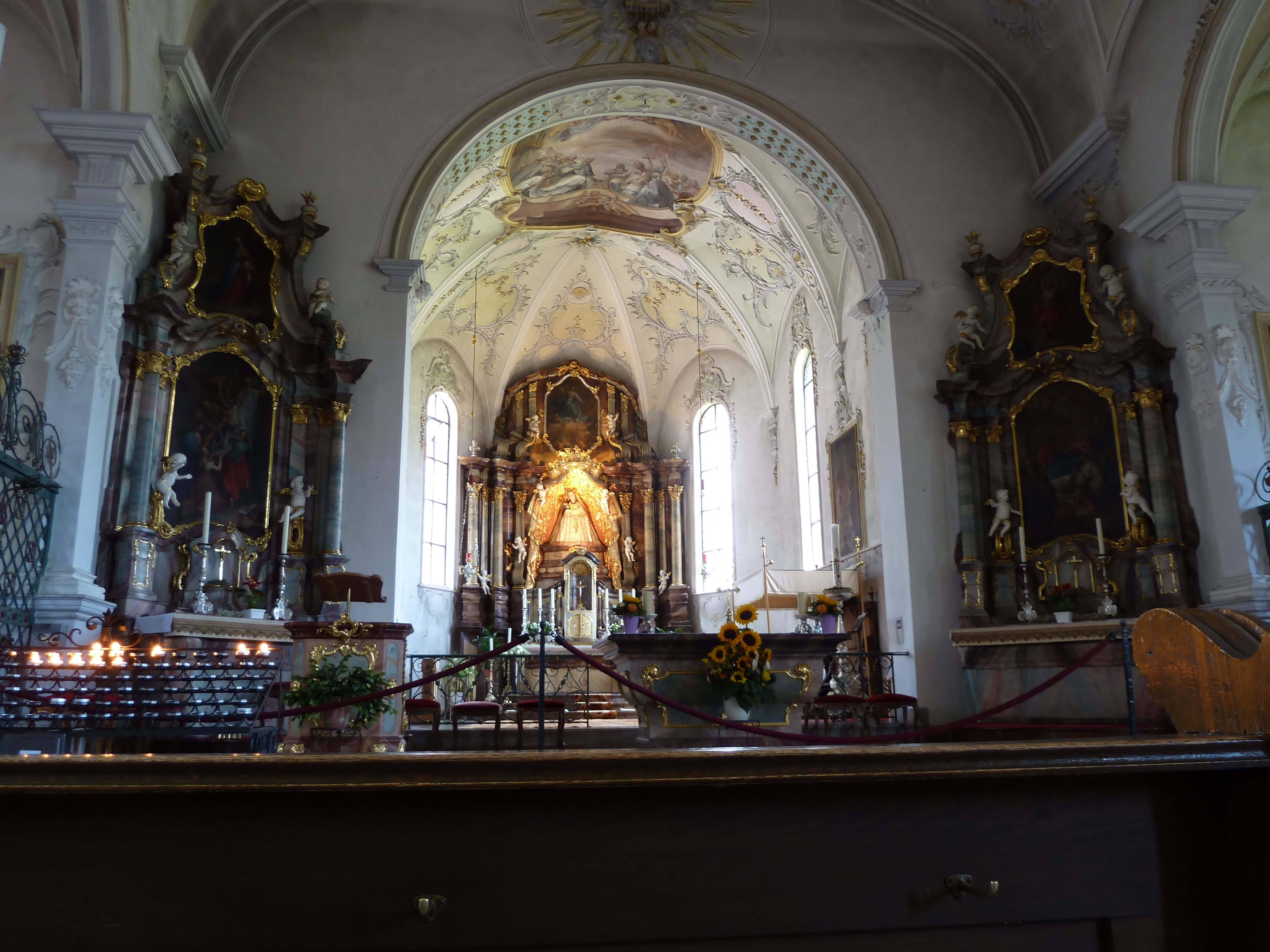 Wallfahrtskirche Todtmoos, Blick zum Deckenfresko von Johann Anton Morath